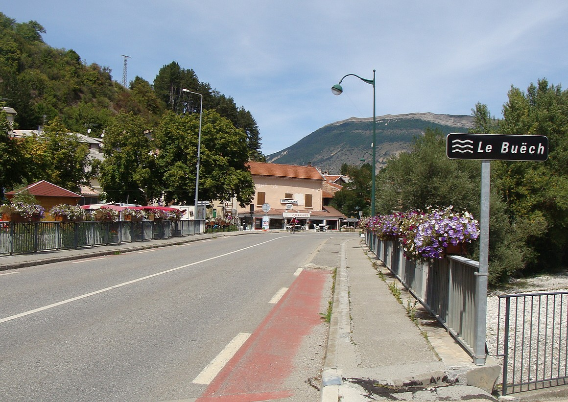 Le pont de la grand-route (ex-nationale 75) sur le Buech à Aspremont (Hautes-Alpes).